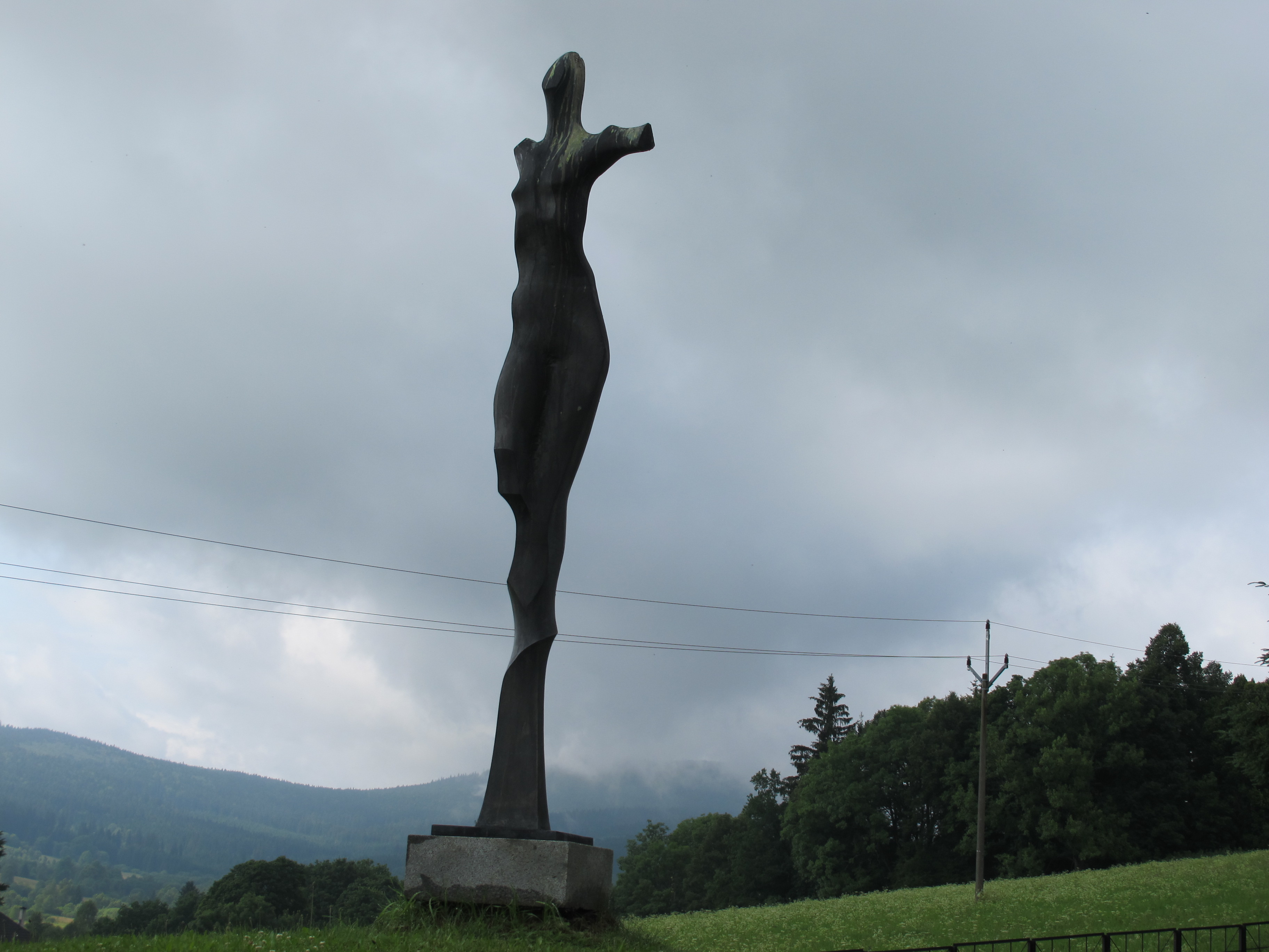 Hřbitov, Zlatá stezka, Volary, Volary.